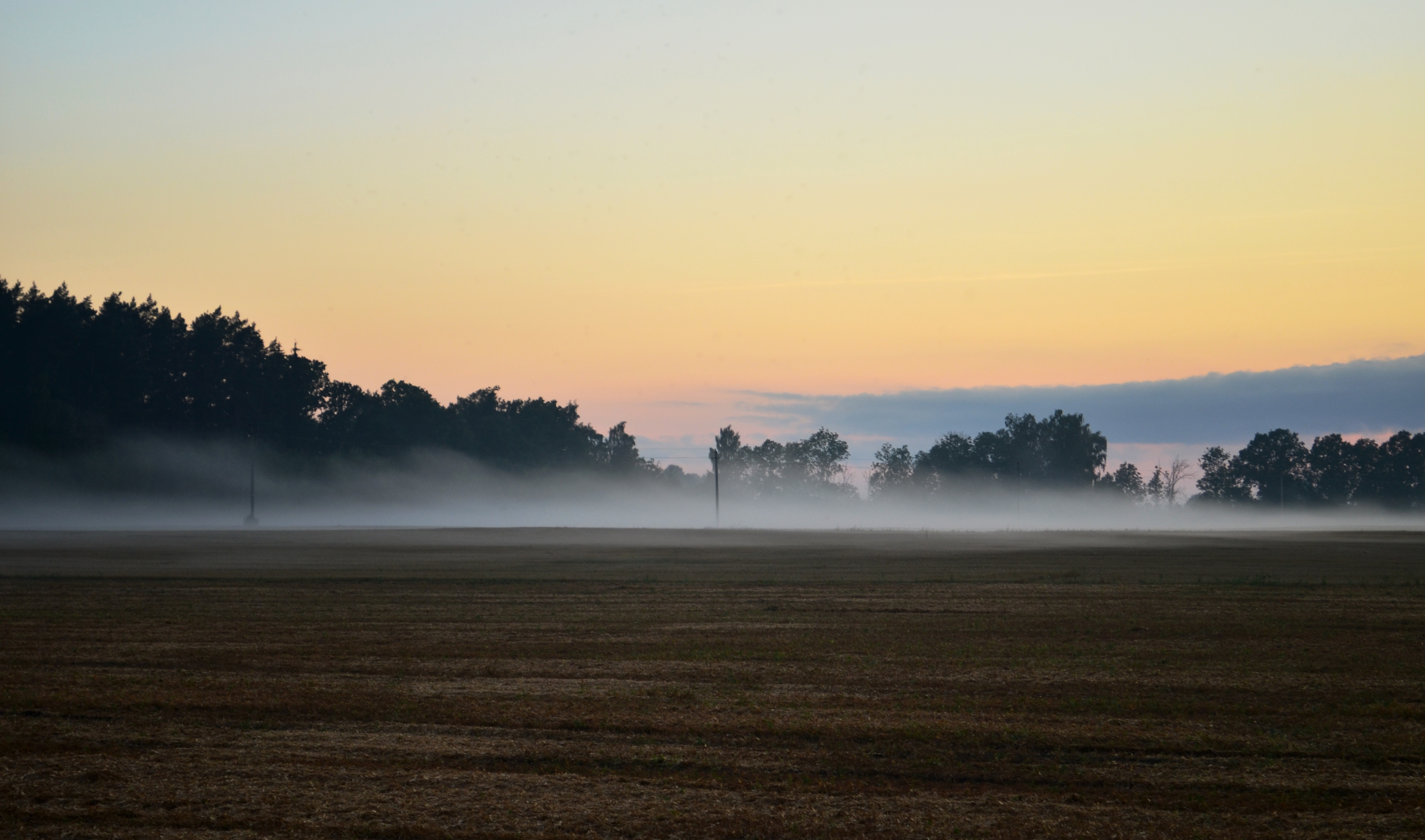 Migla. Tubių kaimo apylinkės, Kėdainių raj.